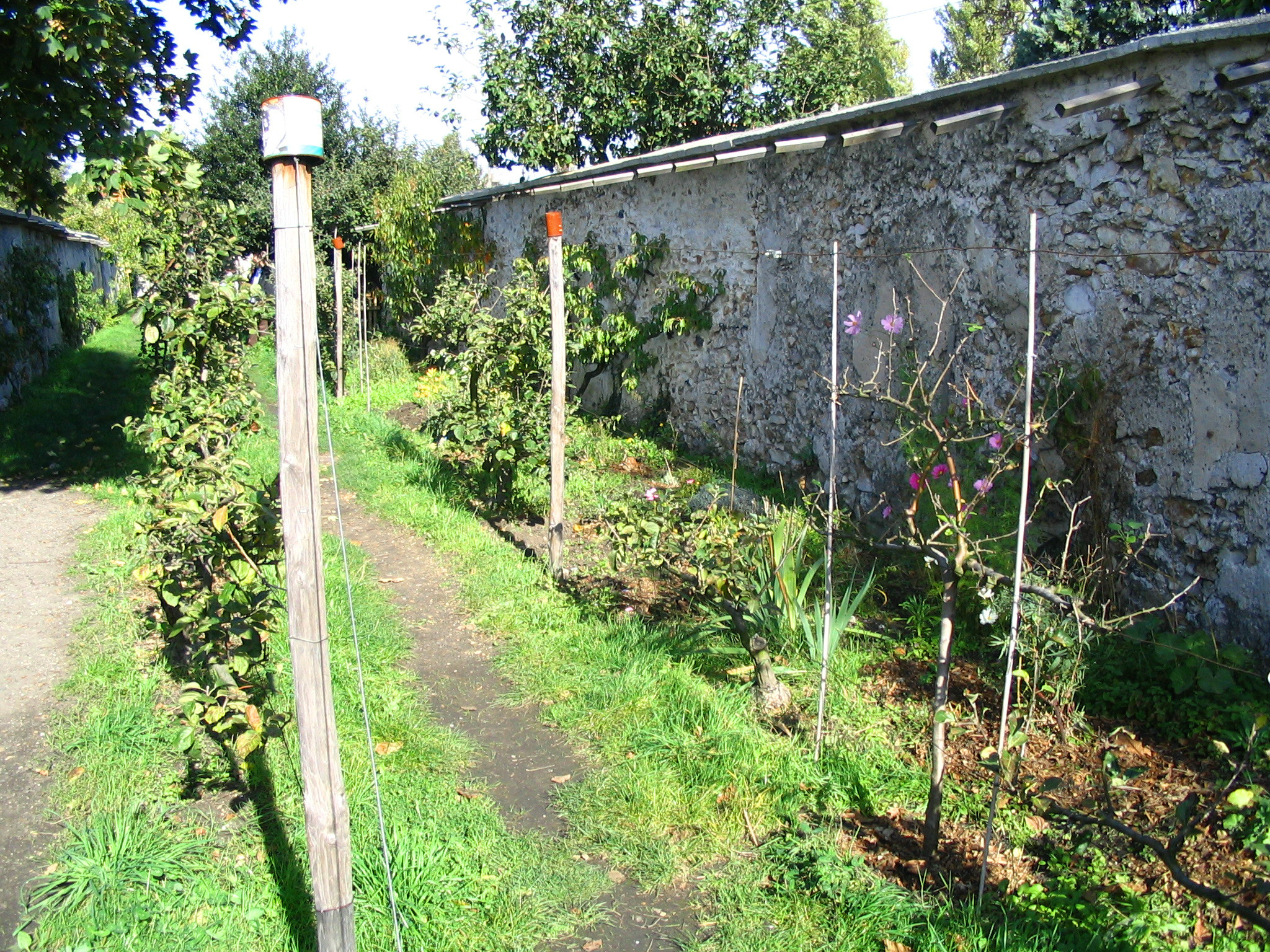 Murs à pêches à Montreuil - France Auteur/author: P.Charpiat - 2006